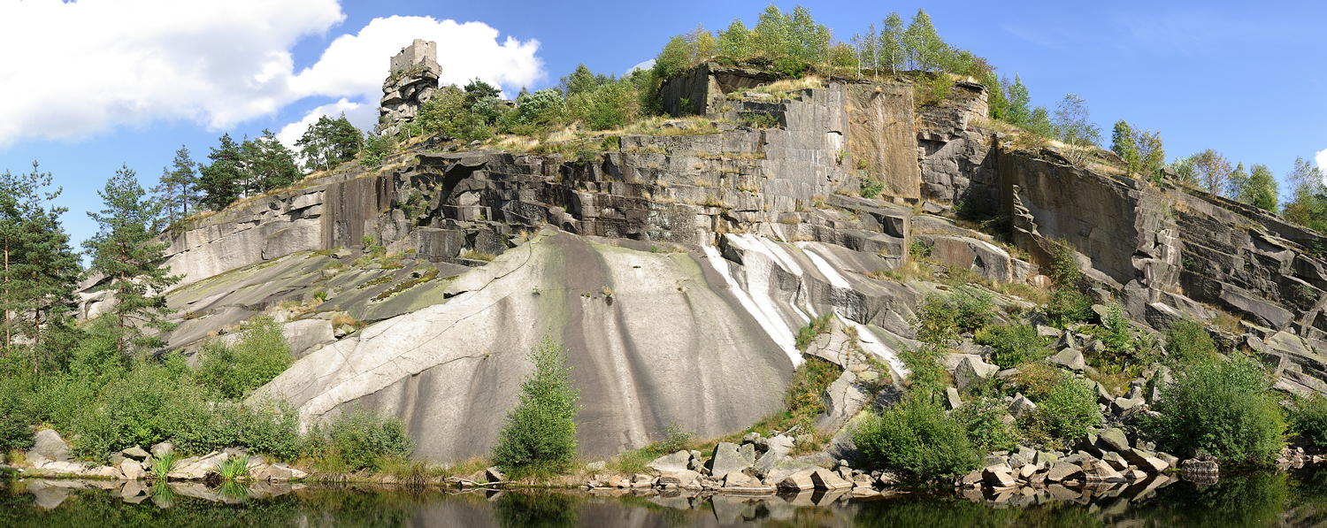 Naturschutzgebiet „Schloßberg Flossenbürg“, Ansicht von Norden, ehemaliger Steinbruch mit Burgruine Flossenbürg, sog. „Zwiebelschalengranit“